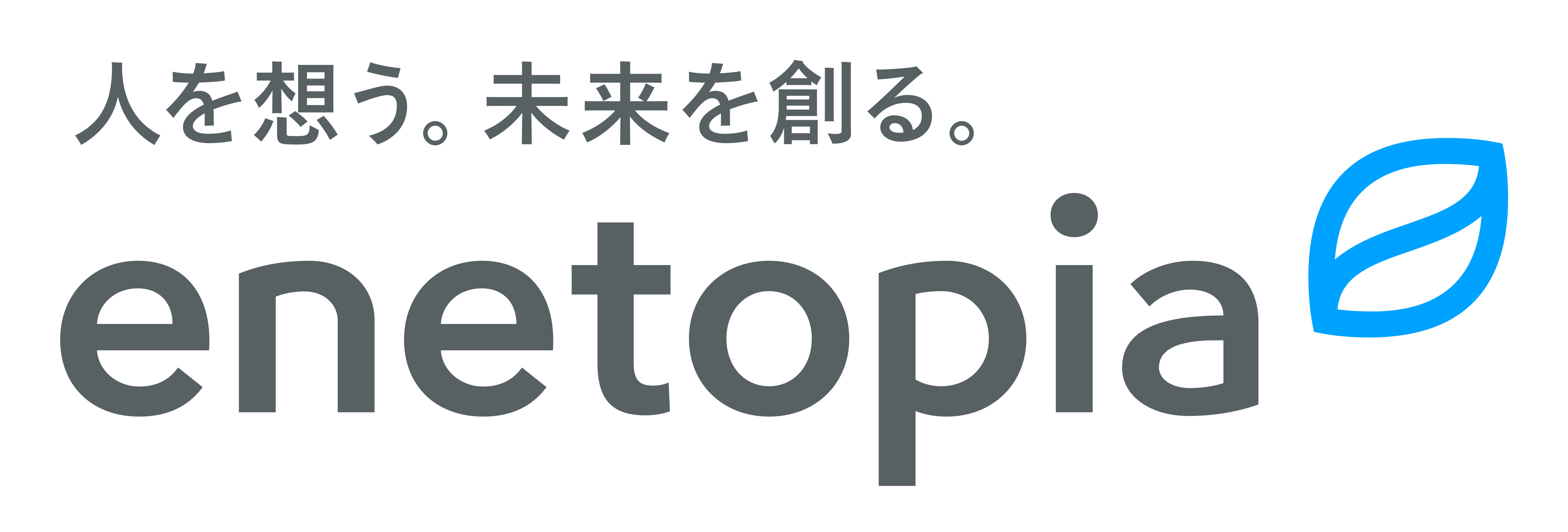 enetopia logo